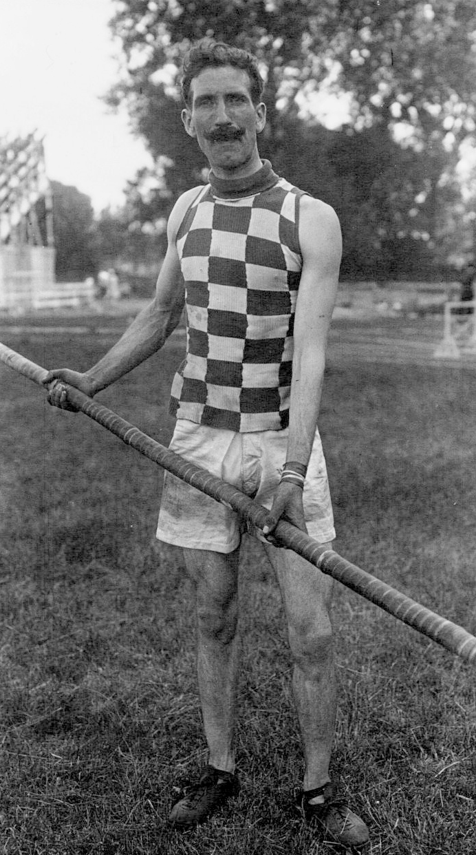 Colombes, championnat de France d'athlétisme : [Paul] Lagarde, gagnant du saut à la perche [(3,60 m)] : [photographie de presse] / Agence Meurisse